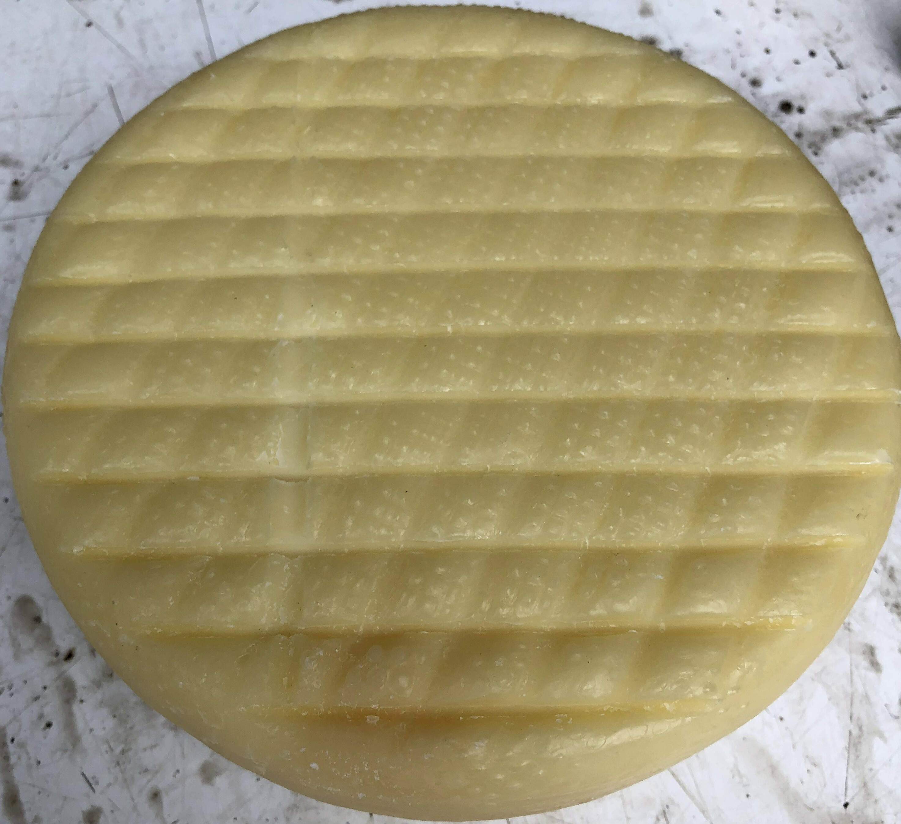 Caciotta marchigiana